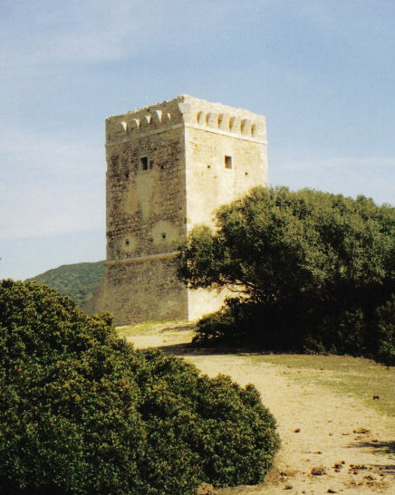 Particolare della Torre di Collelungo nel Parco naturale della Maremma; foto scattata con apparecchio non digitale nel febbraio 2002 da Vinattieri Matteo che lascia in pubblico dominio dopo parziale rielaborazione